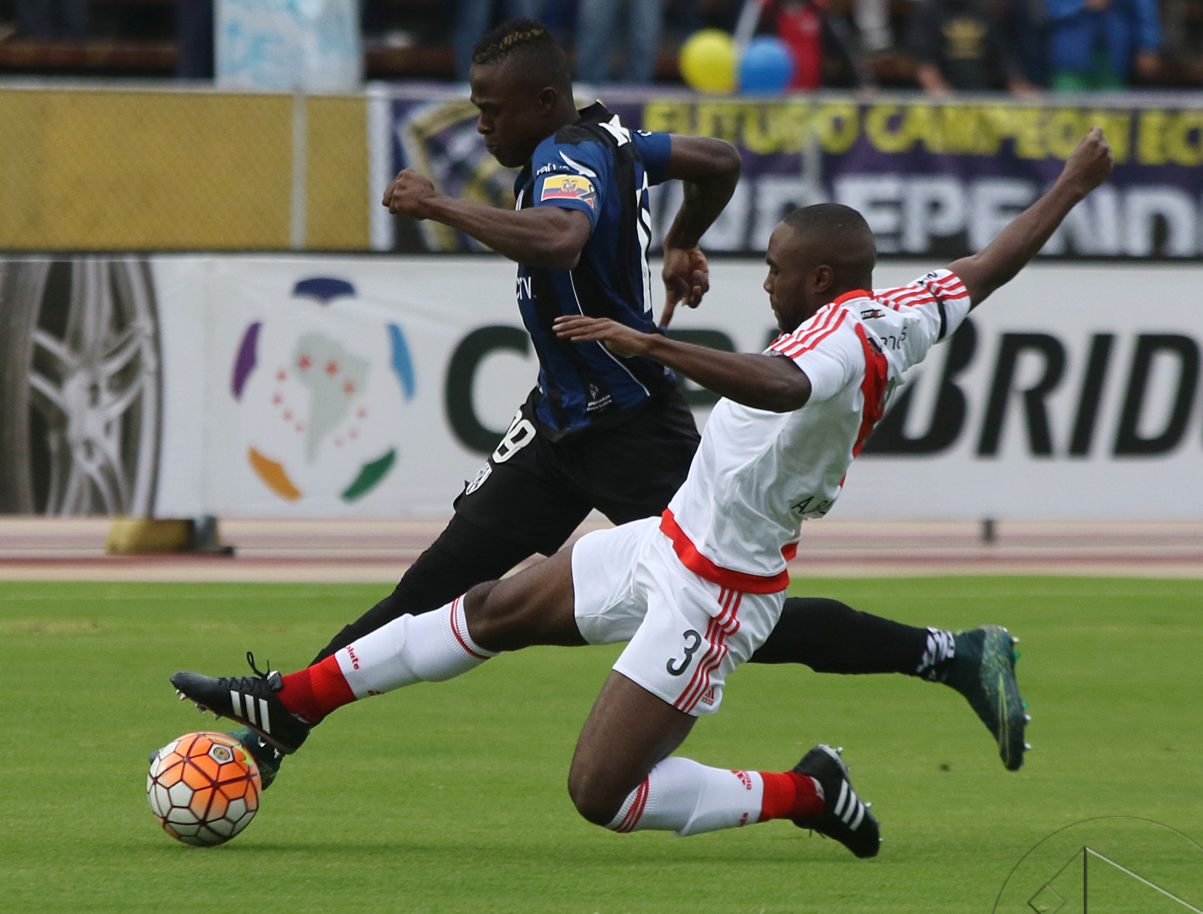 Quito, 28 abr (Andes).- Ante más de 35.000 personas entre hinchas del Independiente, Barcelona, Liga de Quito, El Nacional, Emelec, la selección ecuatoriana, entre otros, Independiente del Valle derrotó 2-0 a River Plate de Argentina, actual campeón de la Libertadores, en los octavos de final del torneo continental. ANDES/Micaela Ayala V.